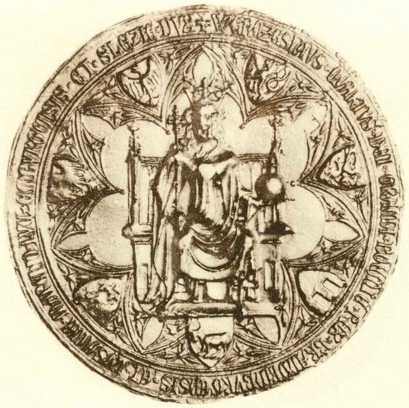 Abbildung des Siegels Wenzels IV. von 1363.